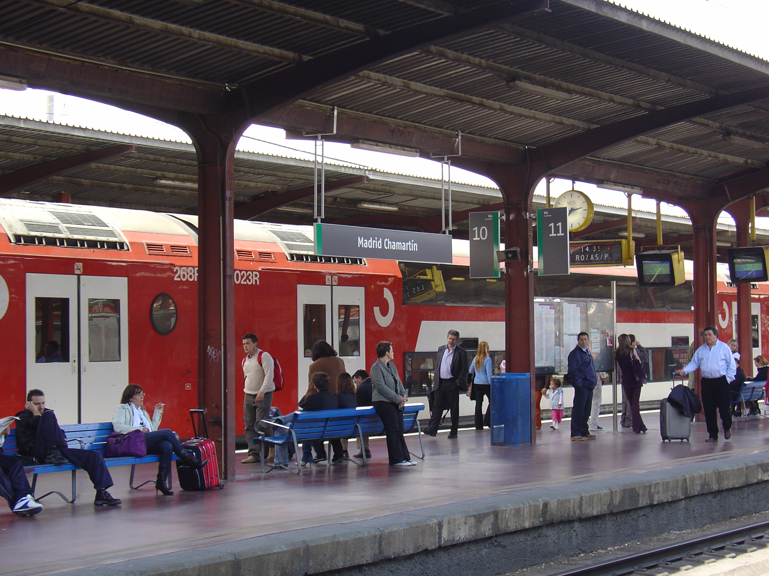 Andén de la estación de tren de Madrid Chamartín. Al fondo, un cercanías de dos pisos.